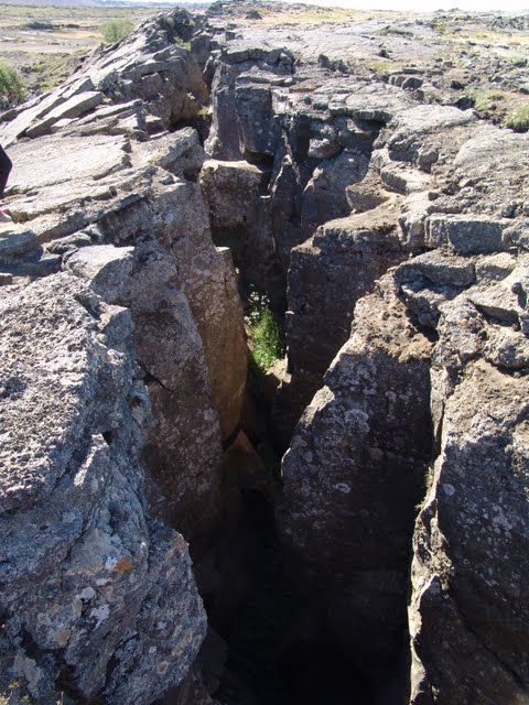 Разлом земной коры, образованный расхождением Северо-Американской и Евразийской плит